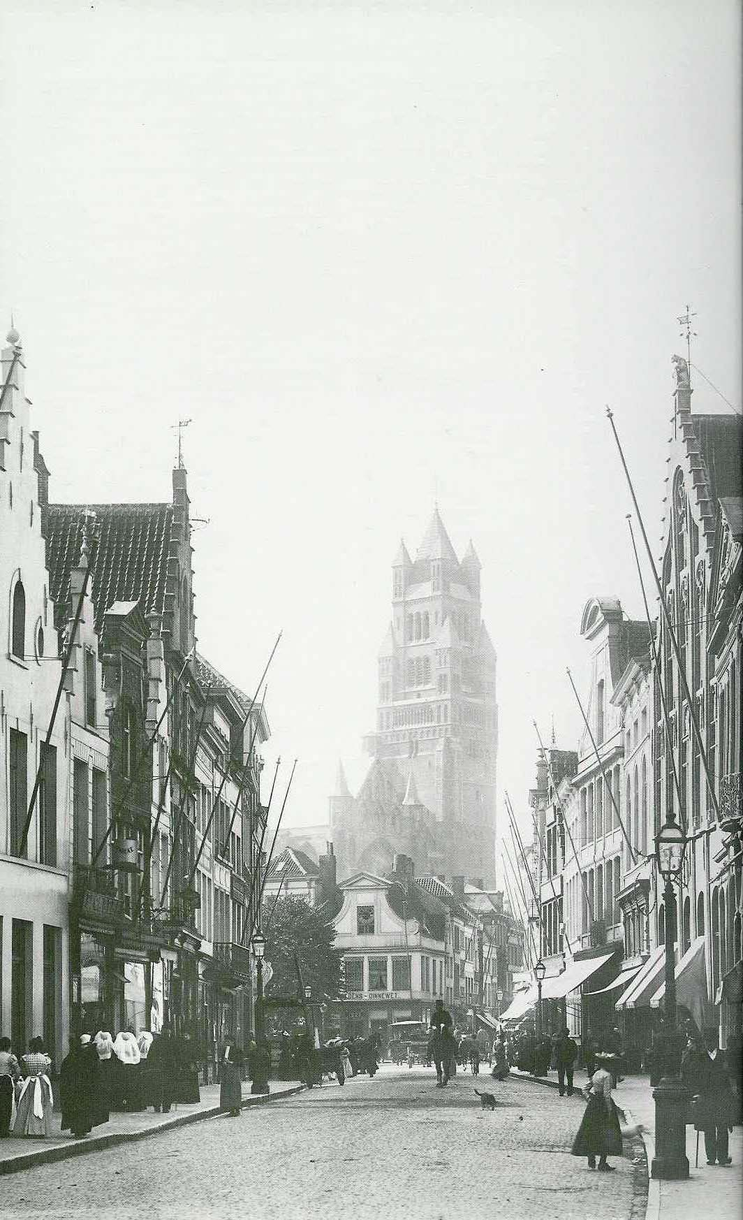 De Steenstraat in 1890 - Brugge - West-Vlaanderen - België